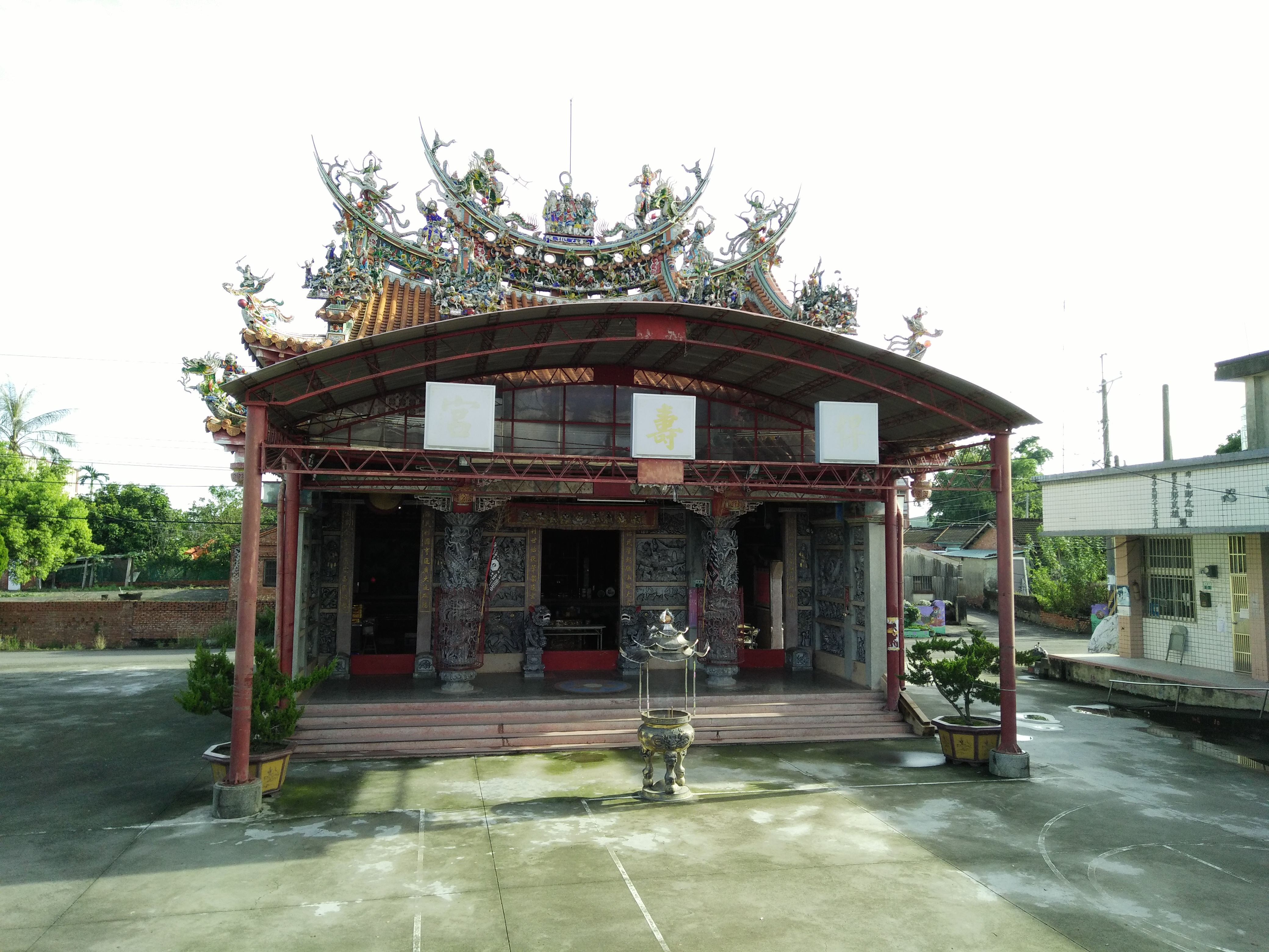 新港鄉海瀛村保壽宮